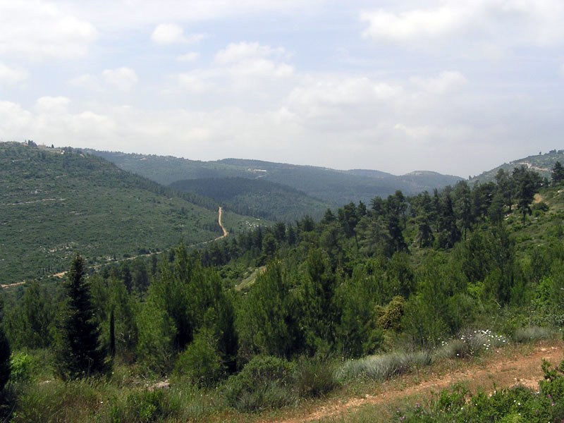 Jerusalem mountains